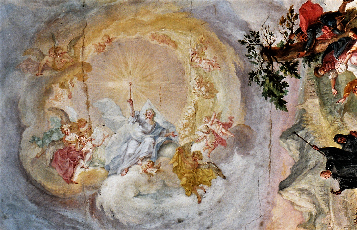 St. Magnus (Unterrammingen), Szenen aus dem Leben des heiligen Magnus, Langhausfresko (1769): Am Himmel erscheint in einem großen Kranz aus Wolken, Engeln und Putten eine hell gekleidete Frauengestalt, die die göttliche Vorsehung (providentia divina) symbolisiert